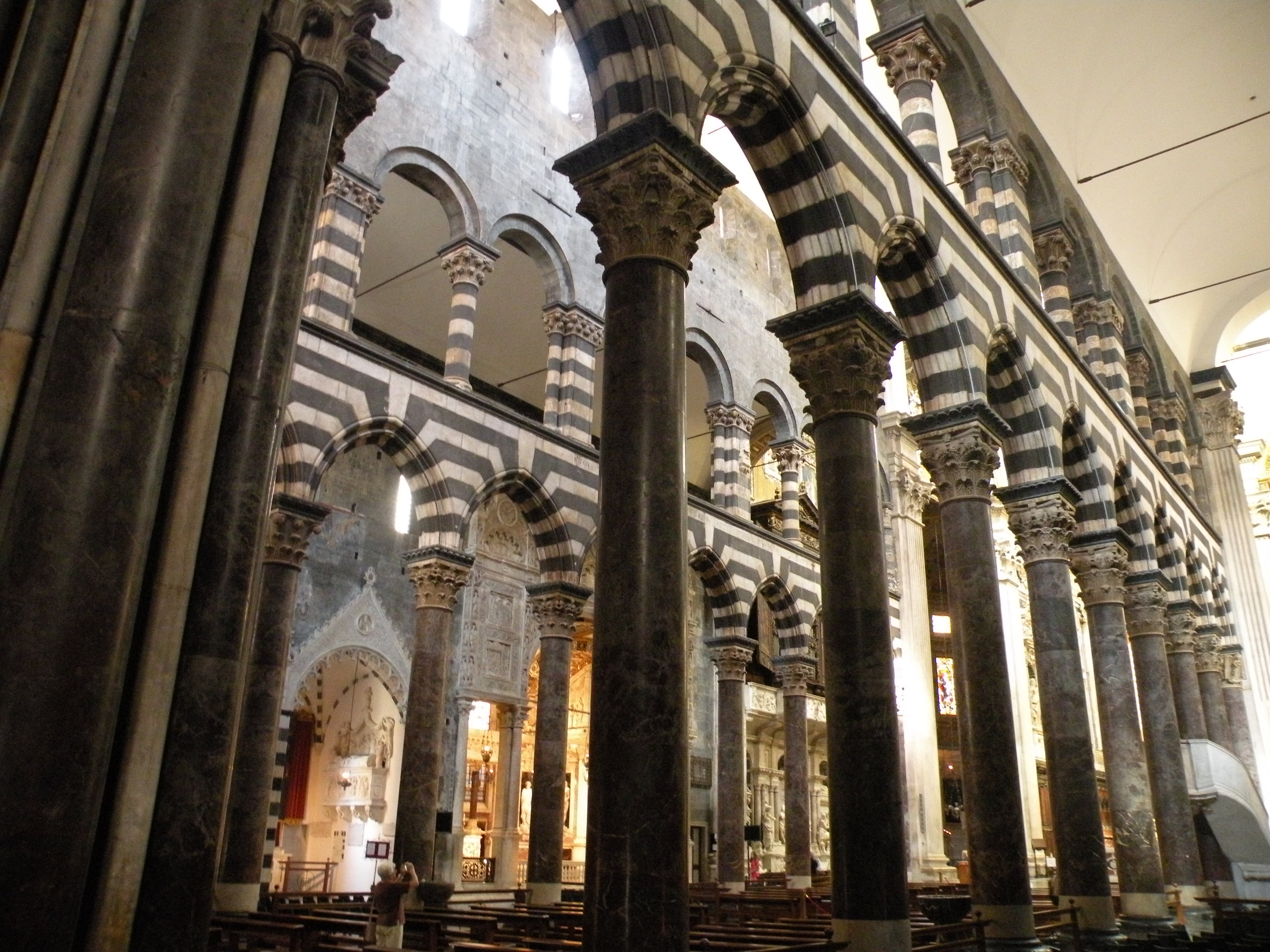 San Lorenzo (Genoa) - Inside